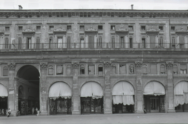 Servizio fotografico : Bologna, 1979 / Paolo Monti. - Strisce: 1, Fotogrammi complessivi: 4 : Negativo b/n, gelatina bromuro d'argento/ pellicola ; 35 mm. - ((Sul portanegativi: N[I]K[MA]T FP4. - All'interno del portanegativi: la serie è anche identificata da una linea orizzontale a pennarello nero che separa la suddetta serie dalla precedente di soggetto diverso. - Occasione: Documentazione Musei e Palazzi di Faenza per mostra "L'età Neoclassica a Faenza" [Felice Giani] su ordinazione del Professor Andrea Emiliani. - Fonte: Agenda di Paolo Monti: Nikon Leika 3001-/ Monti 1978 (1978-1982), presso Archivio Paolo Monti. - Fonte: Fattura di Paolo Monti: IV. Commesse/ Fattura n. 31/ Fotografie Palazzo Milzetti per mostra L'età Neoclassica a Faenza (1979/10/08), presso Archivio Paolo Monti. - Fonte: Monografia di Biennale d'Arte Antica (10. ; 1979): L'età neoclassica a Faenza, 1780-1820: Faenza, Palazzo Milzetti, 9 settembre-26 novembre 1979, catalogo della mostra, Faenza 1979, a cura di Anna Ottani Cavina, in L'arte del Settecento in Emilia e in Romagna, Bologna, Alfa (1979)